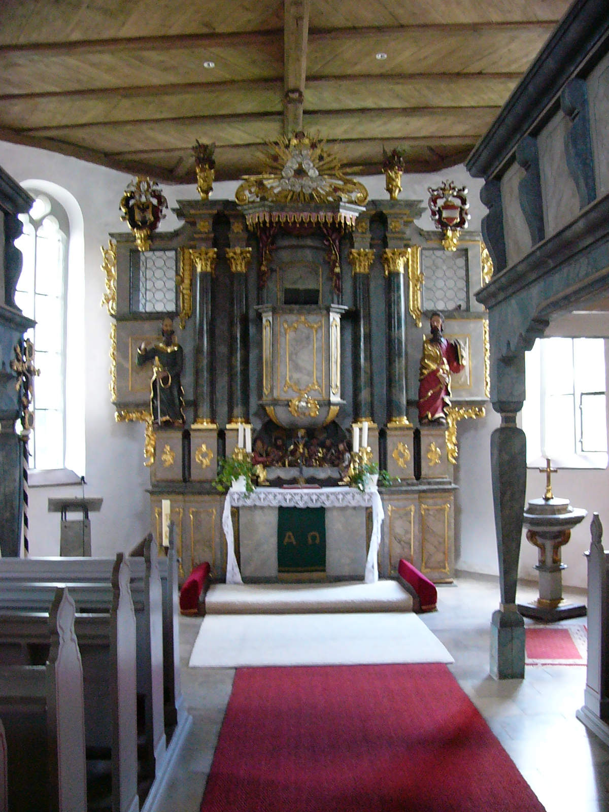 Inneres der Pfarrkirche Döhlau